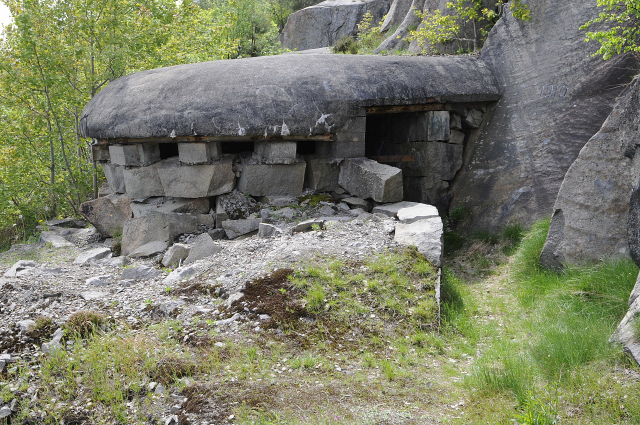 En av skyttergalleriene